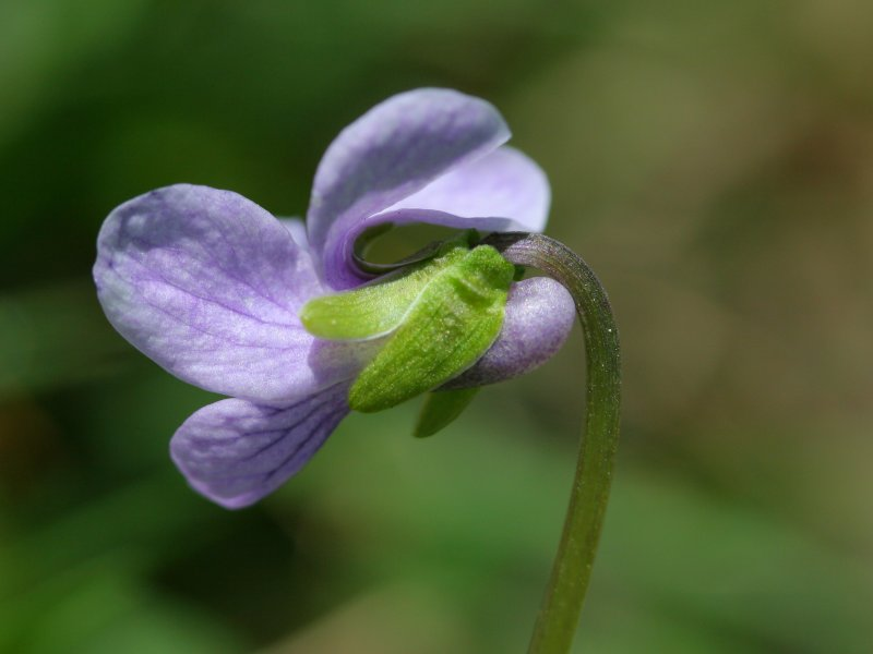 Sumpf-Veilchen (Viola palustris)